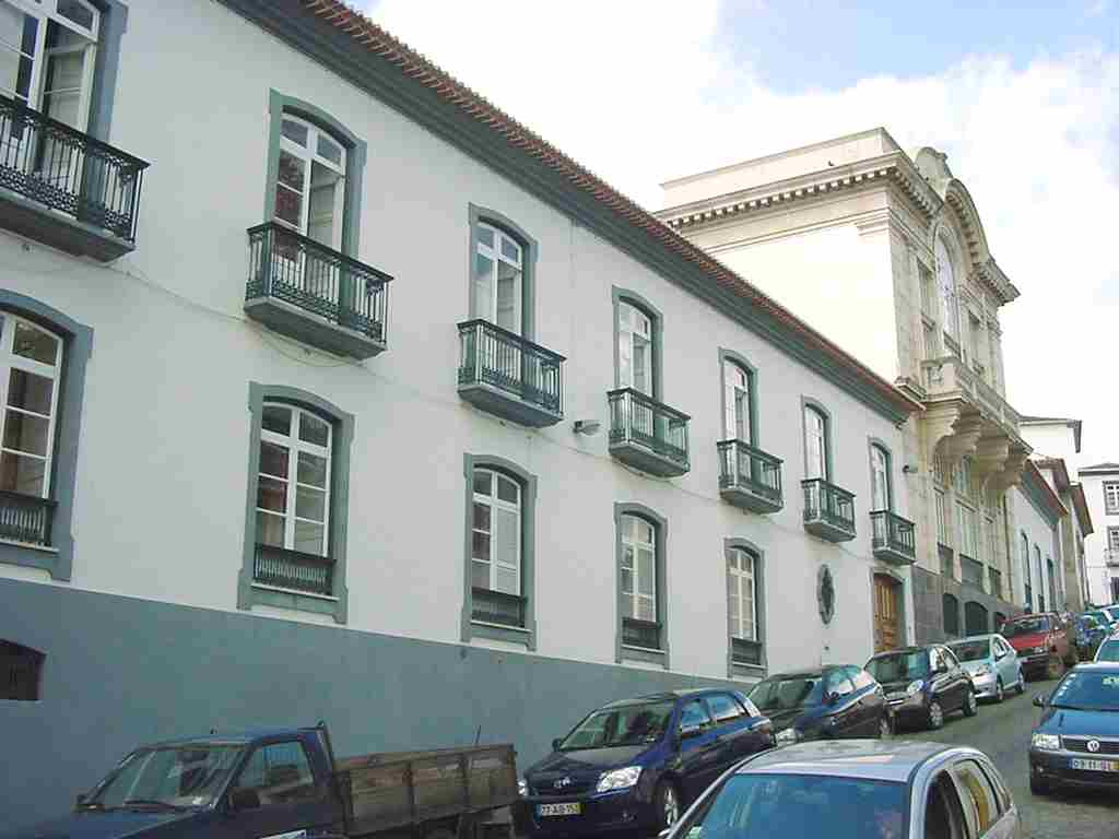 Seminário de Angra do Heroísmo